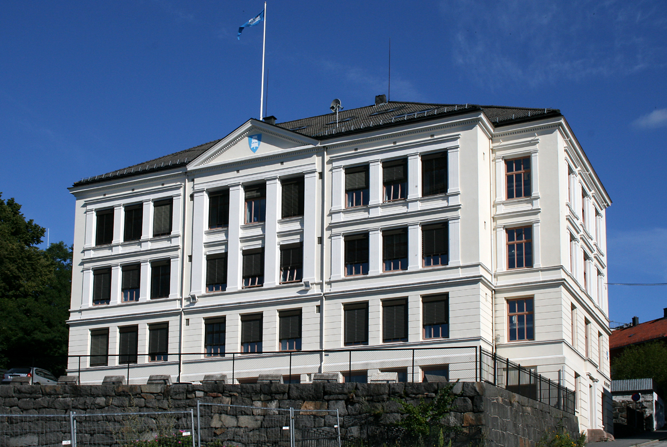 Larvik town hall. Built 1886 as Larvik allmueskole; later Romberggata skole.